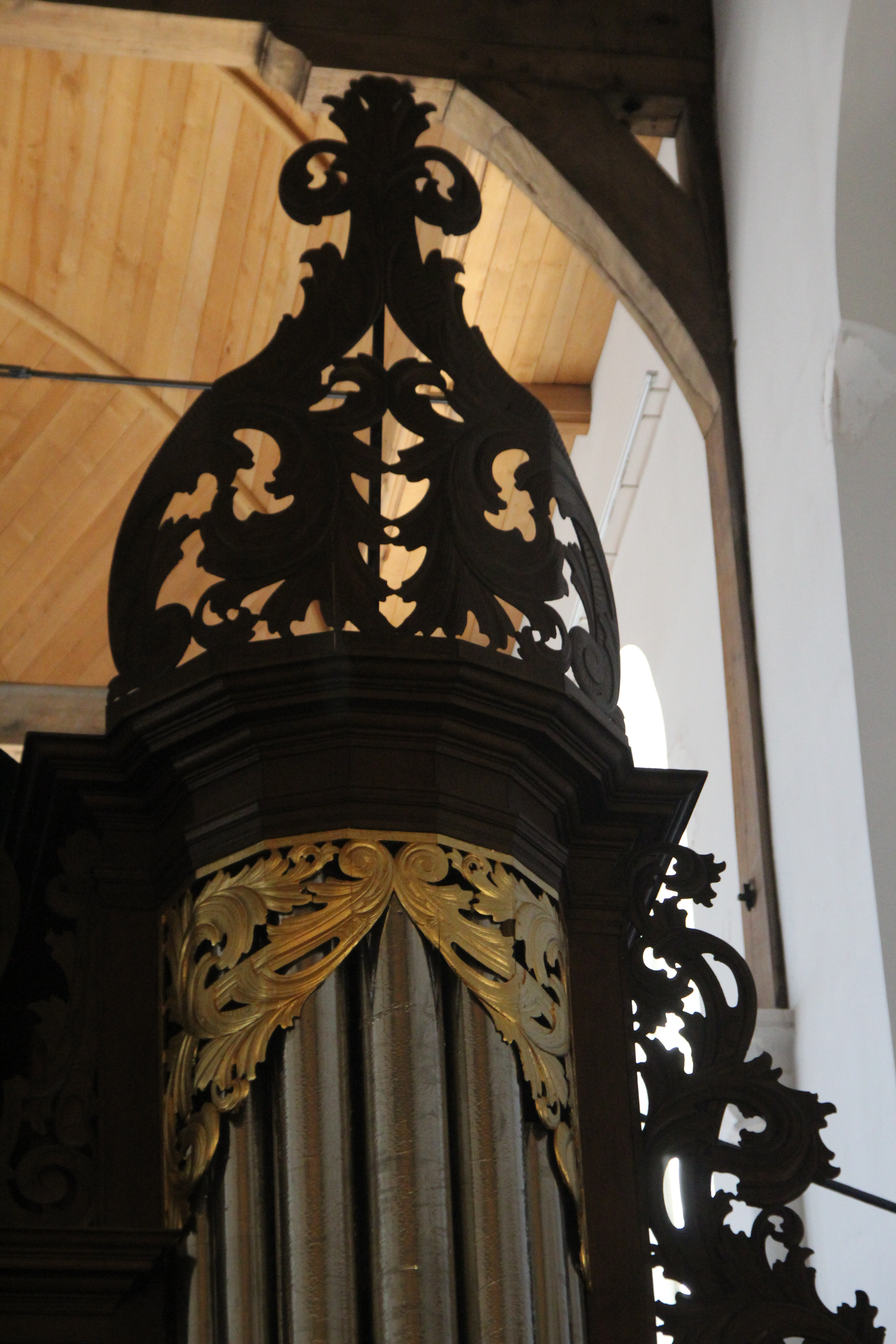 Schnitger-Orgel der Martinikerk in Sneek, Friesland, Niederlande